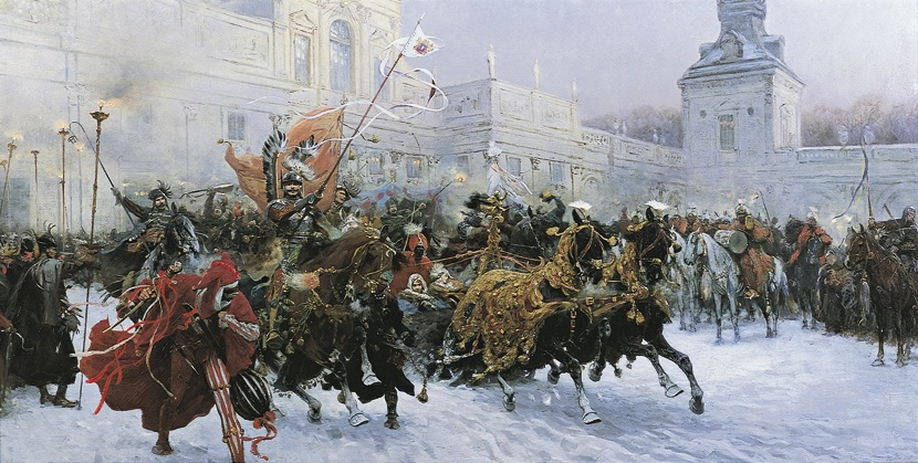 Wyjazd z Wilanowa